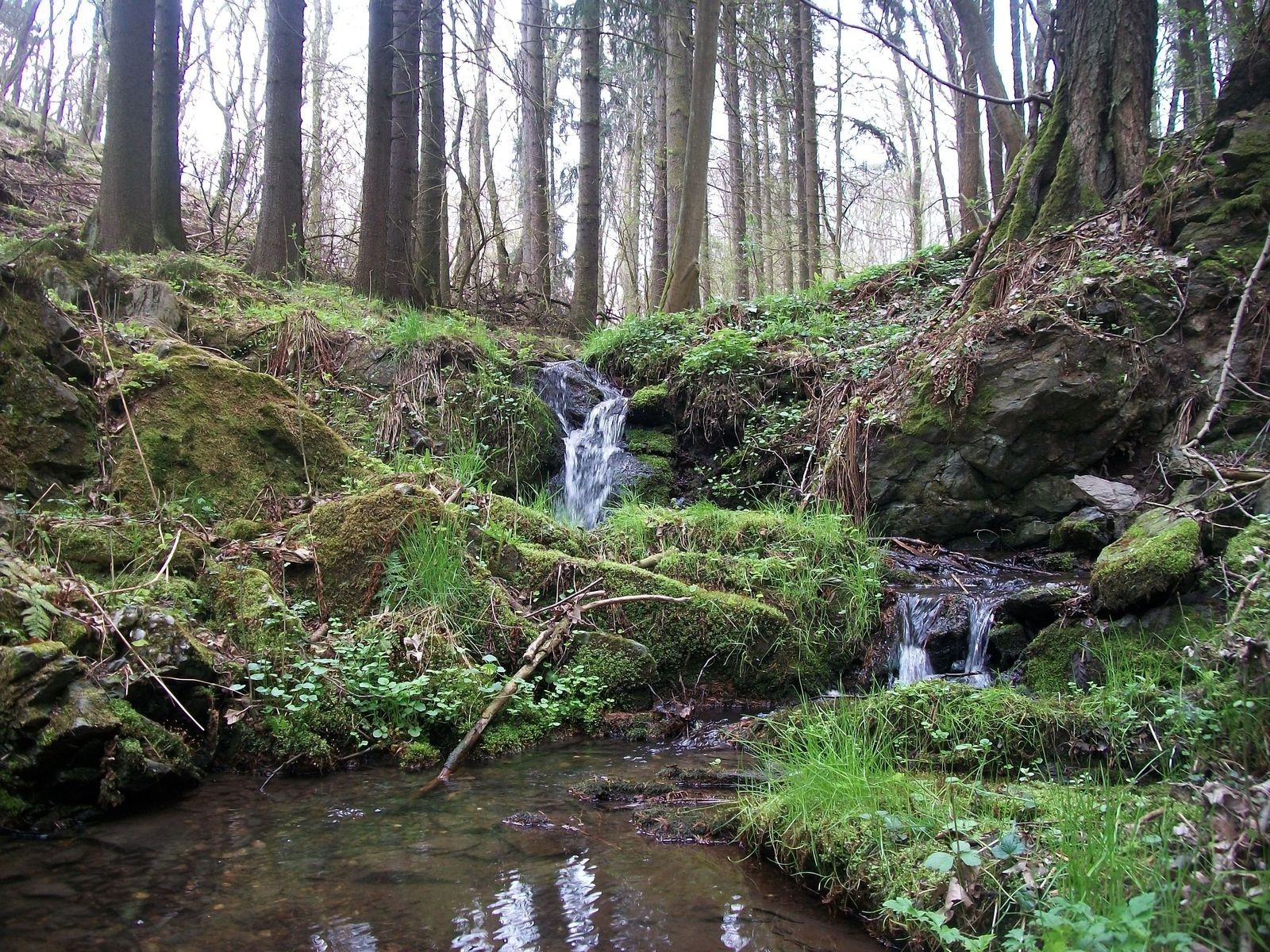 Olešenský potok západně od Olešné (obec Němčovice)